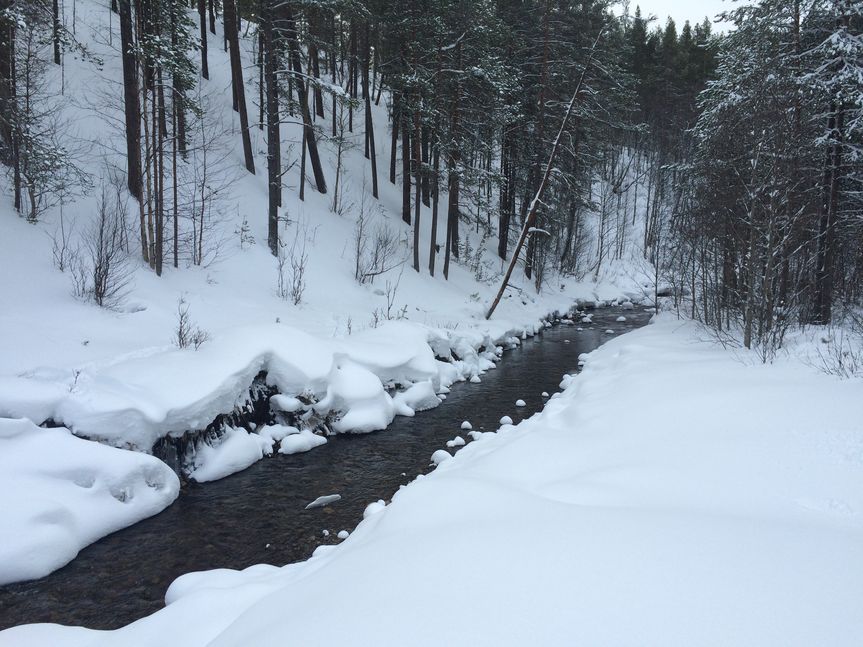 Vesletela, Tolga, Hedmark